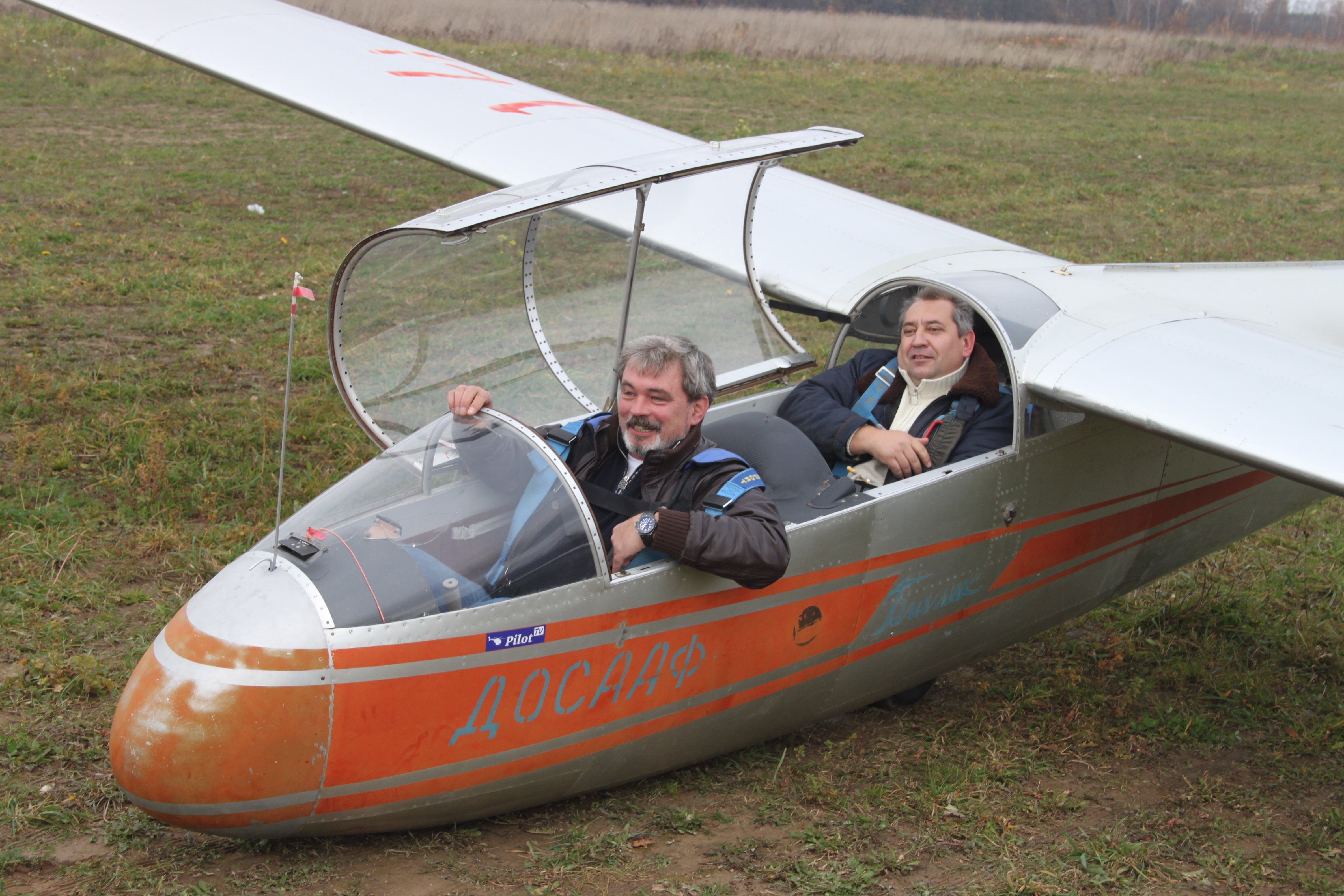 Первый полет Михаила Фариха на планере